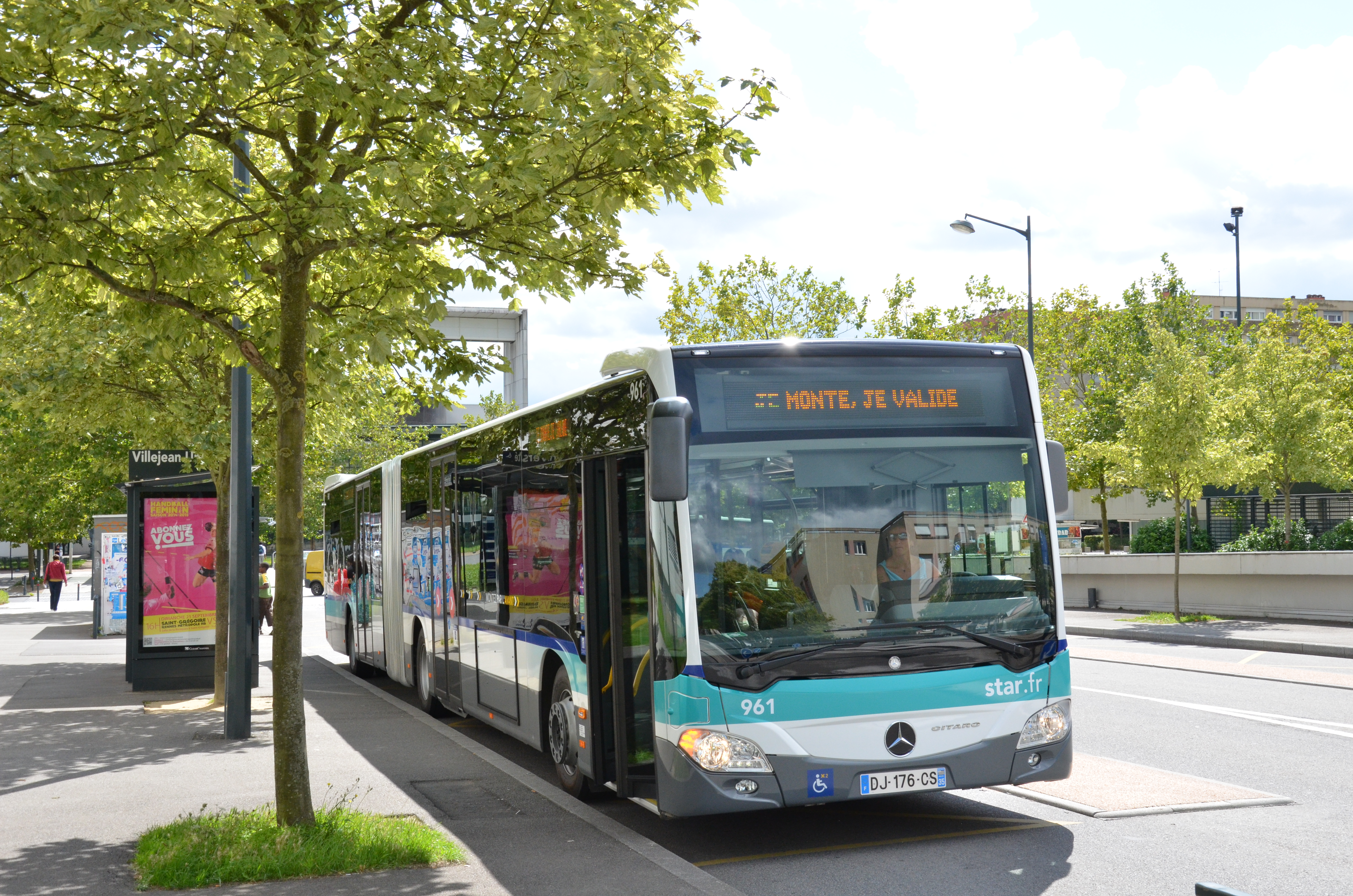 Mercedes Citaro G n°961 de la ligne 4 (devenue Chronostar C4), à l'arrêt Villejean Université du réseau STAR de Rennes.